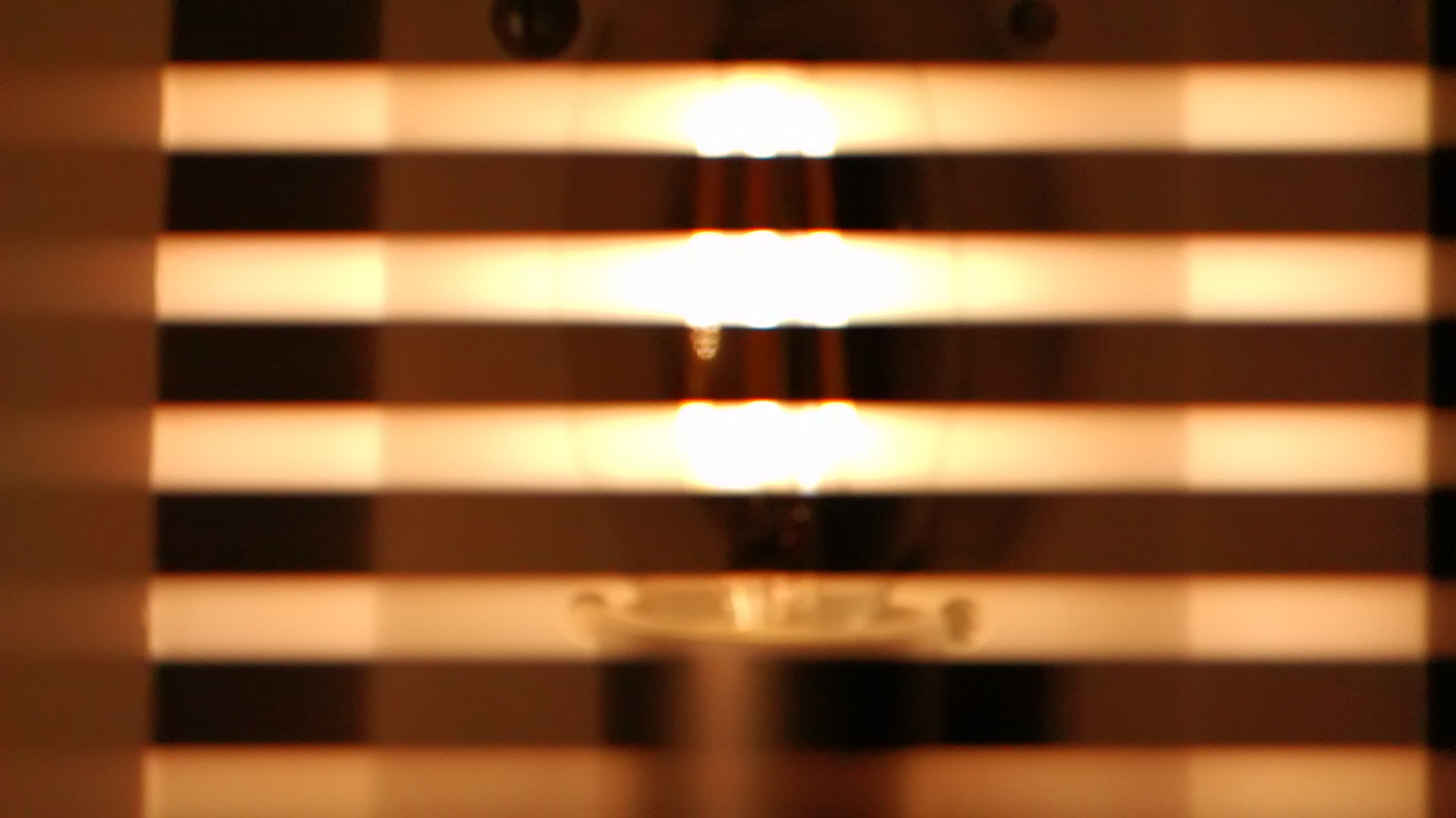 Filament LED dimable flickering interference with digital camera